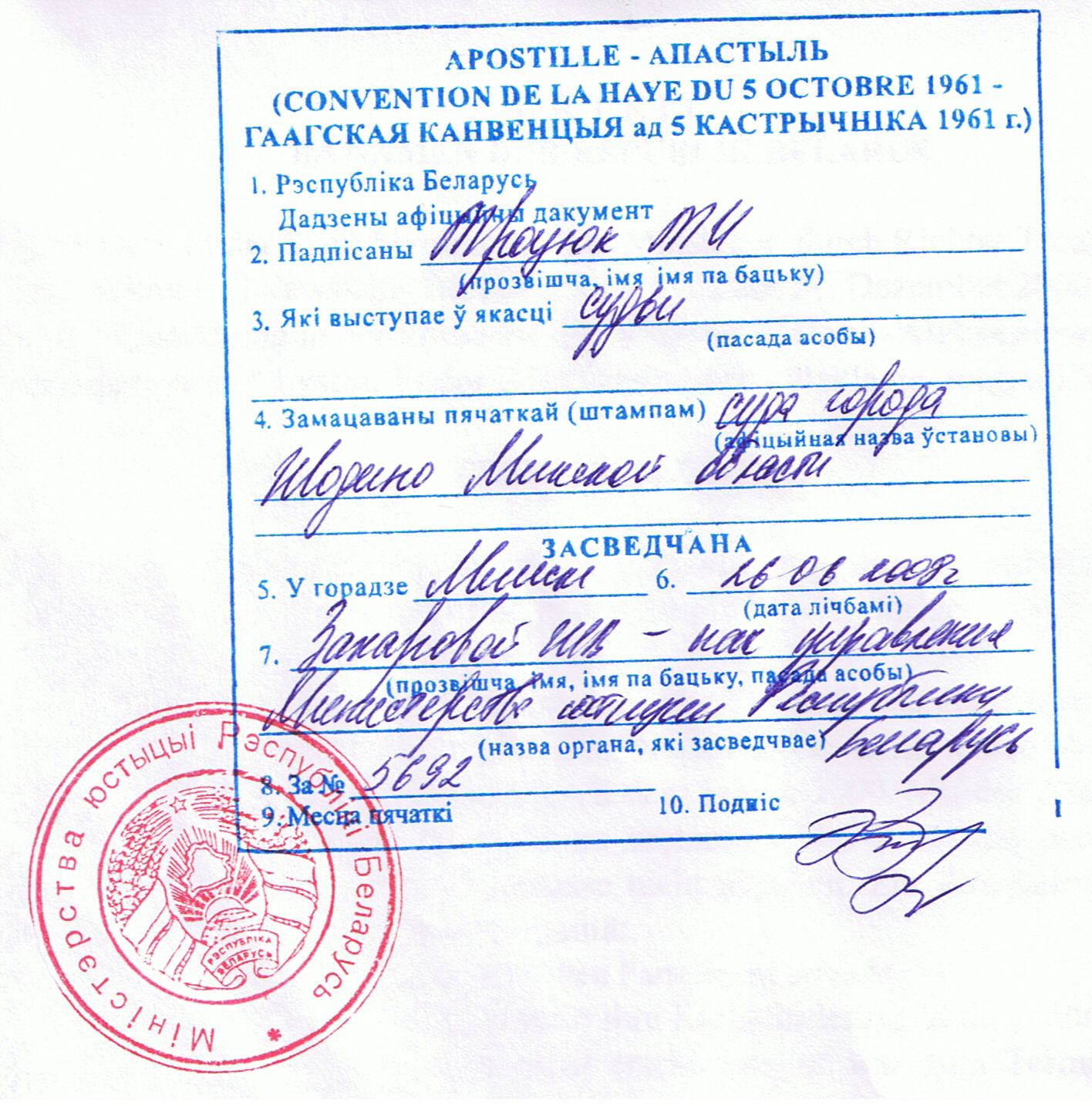 Апостиль (Белоруссия)